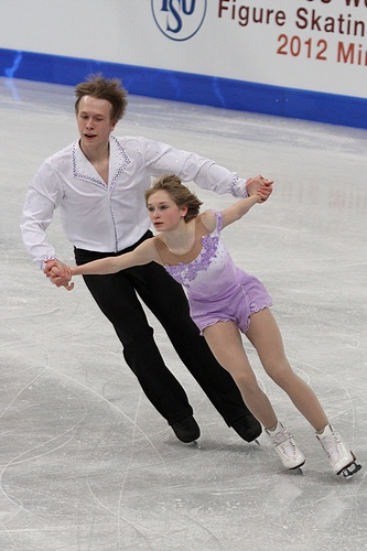 Hayleigh Bell и Элистейр Силвесте (Канада) на чемпионате мира по фигурному катанию среди юниоров 2012